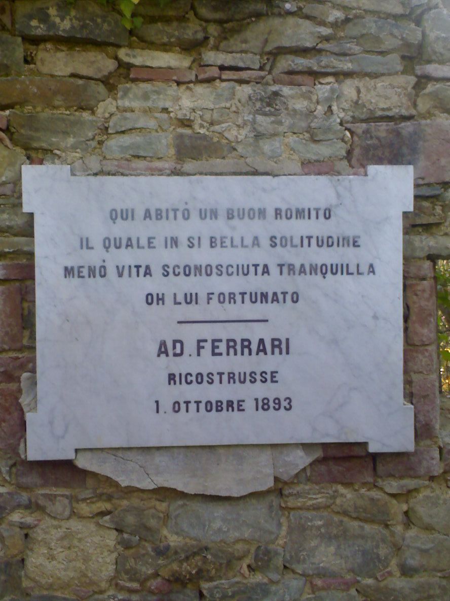 Iscrizione Romitorio